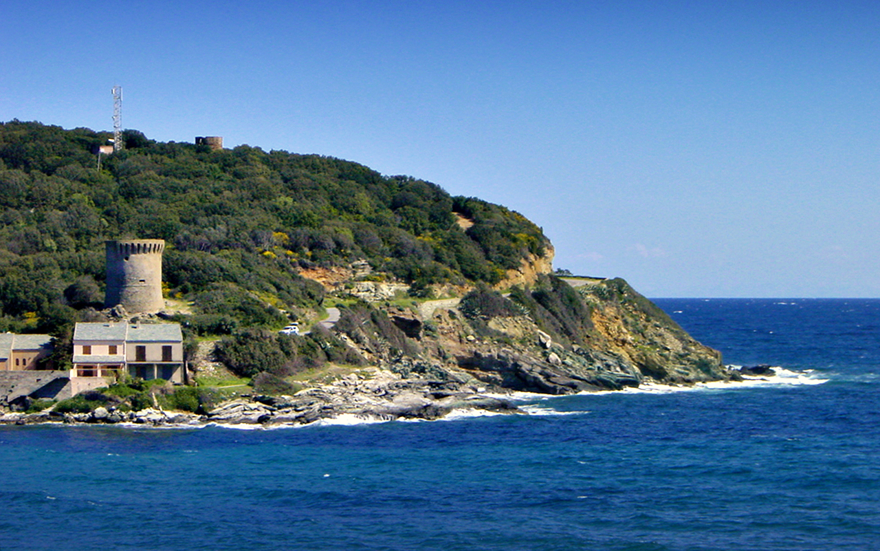 Meria (Corse) - Tour génoise